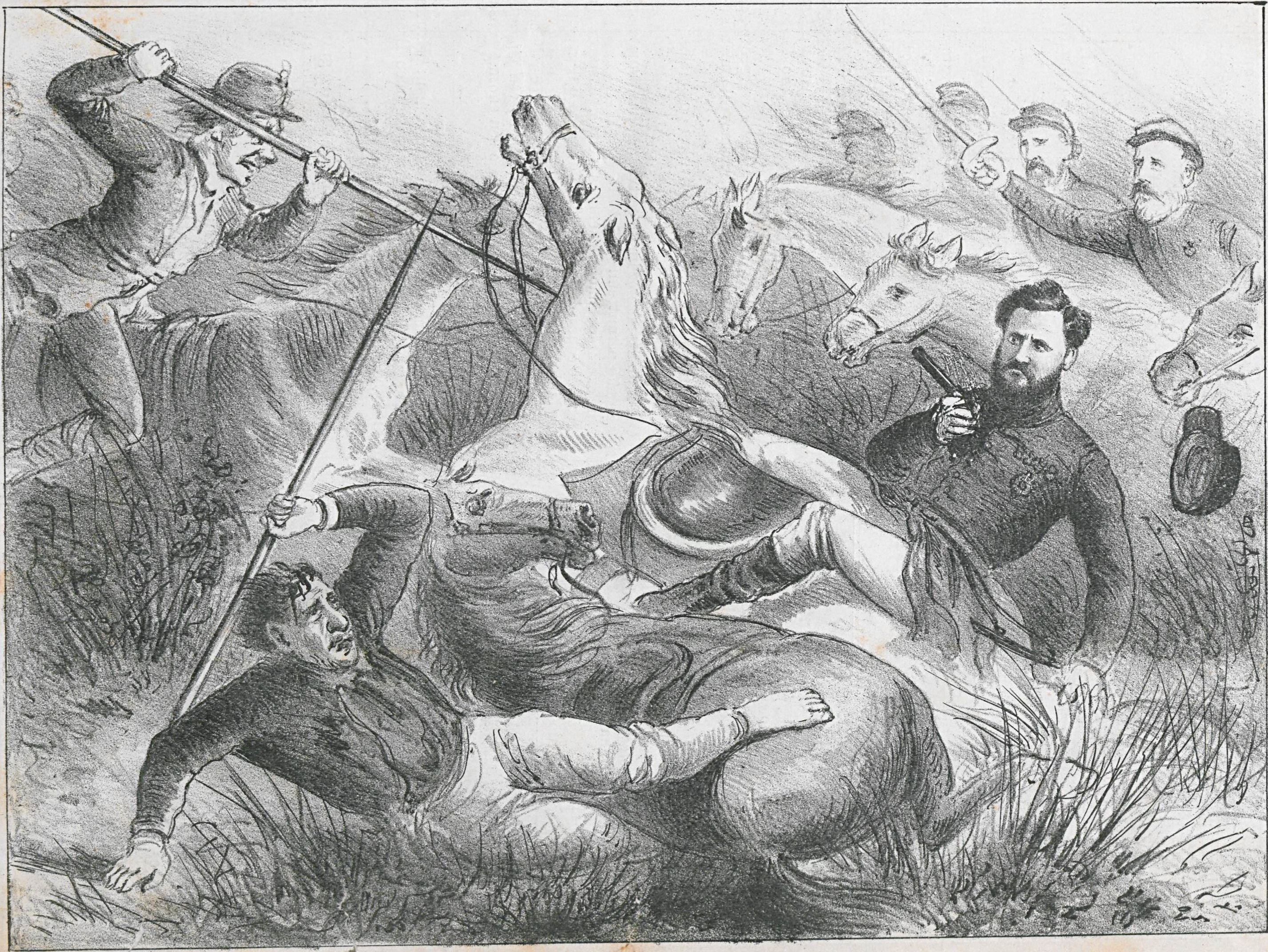 O Capitão Joaquim Pantaleão Telles de Queiroz á frente de 30 homens ia á desfilada quando os paraguayos em fuga voltão-se e carregão também. Dois paraguayos de lança em riste precipitão-se contra Pantaleão que mal teve tempo de ver as lanças sobre o seu peito e de largar-se ao chão, sacando o revolver, e com um tiro matou um paraguayo, e o outro foi morrer nas pontas das lanças dos seus bravos companheiros. Pantaleão foi apenas arranhado em uma perna e nesse dia promovido a major.